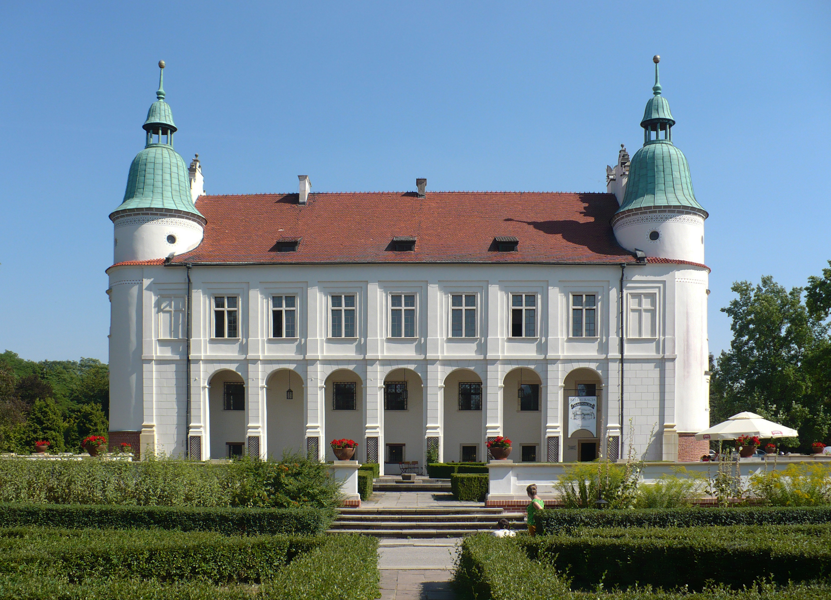 Baranów Sandomierski, zespół zamkowy, 1591-1606, kon. XVII, XIX